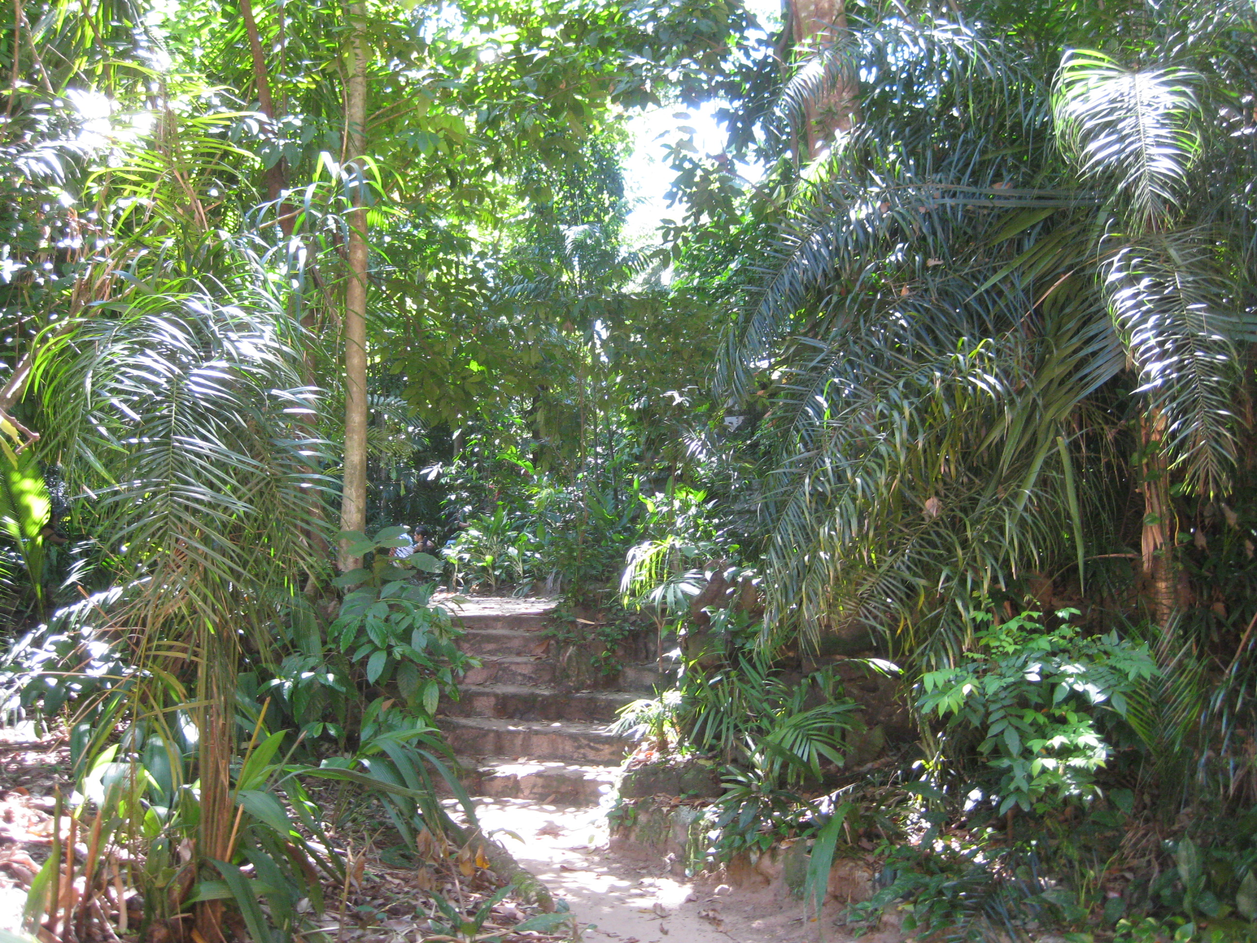 Jardim do Museu Paraense Emílio Goeldi, em Belém, Pará, Brasil. Foto tirada por Koala:Bear em 27 de junho de 2010